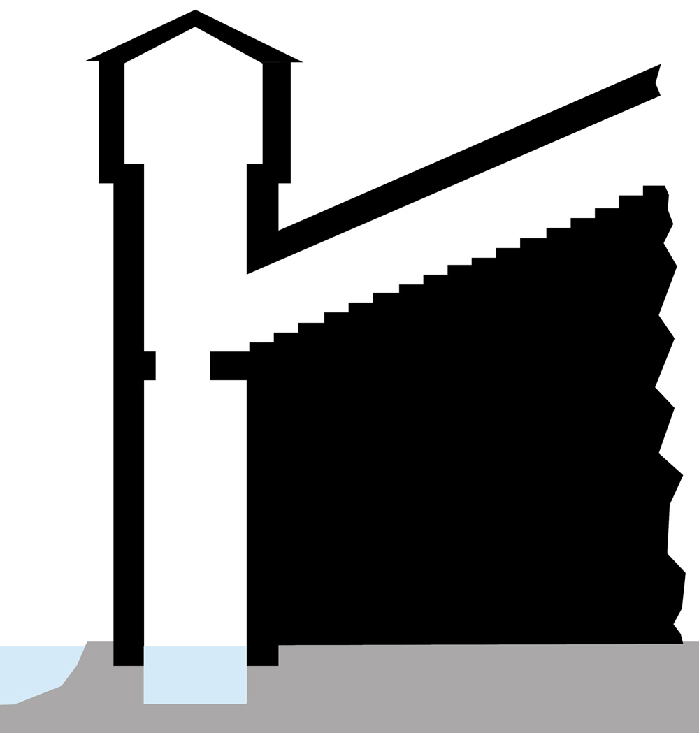 Схема на водна кула